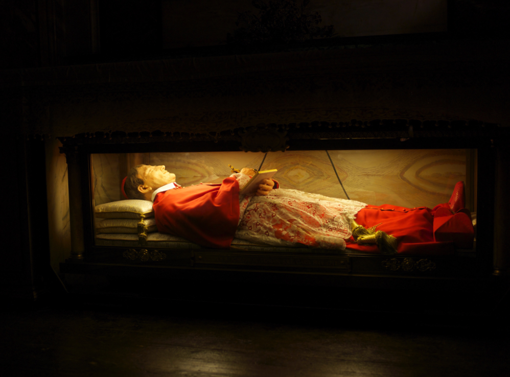 Cardinal Josephi M Tomasi / Giuseppe Maria Tomasi in Rome (wax figurine / alleged corpse)